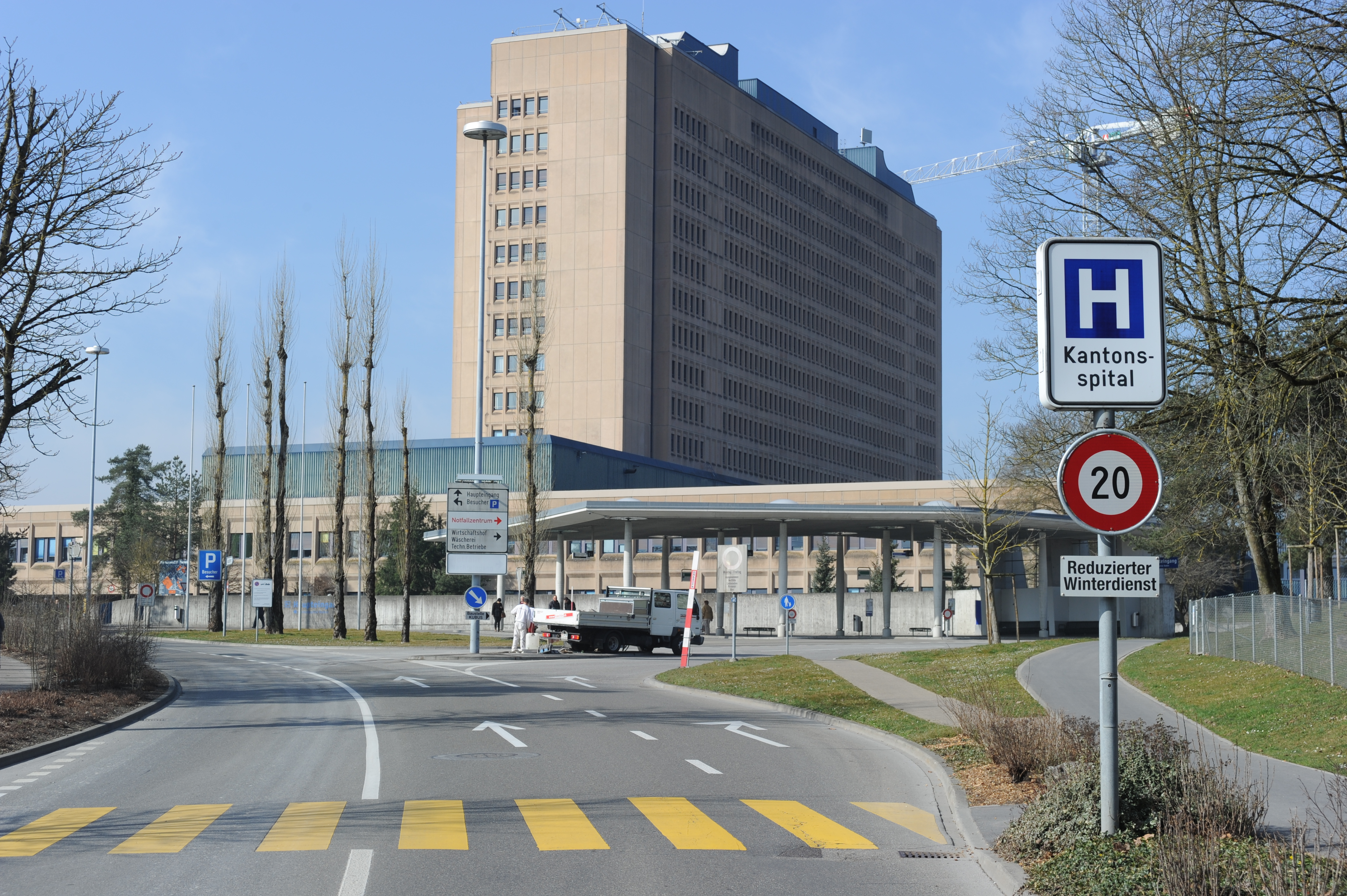 Zufahrt zum Kantonsspital Baden. Im Bild das Hauptgebäude und die Busstation im Vordergrund.